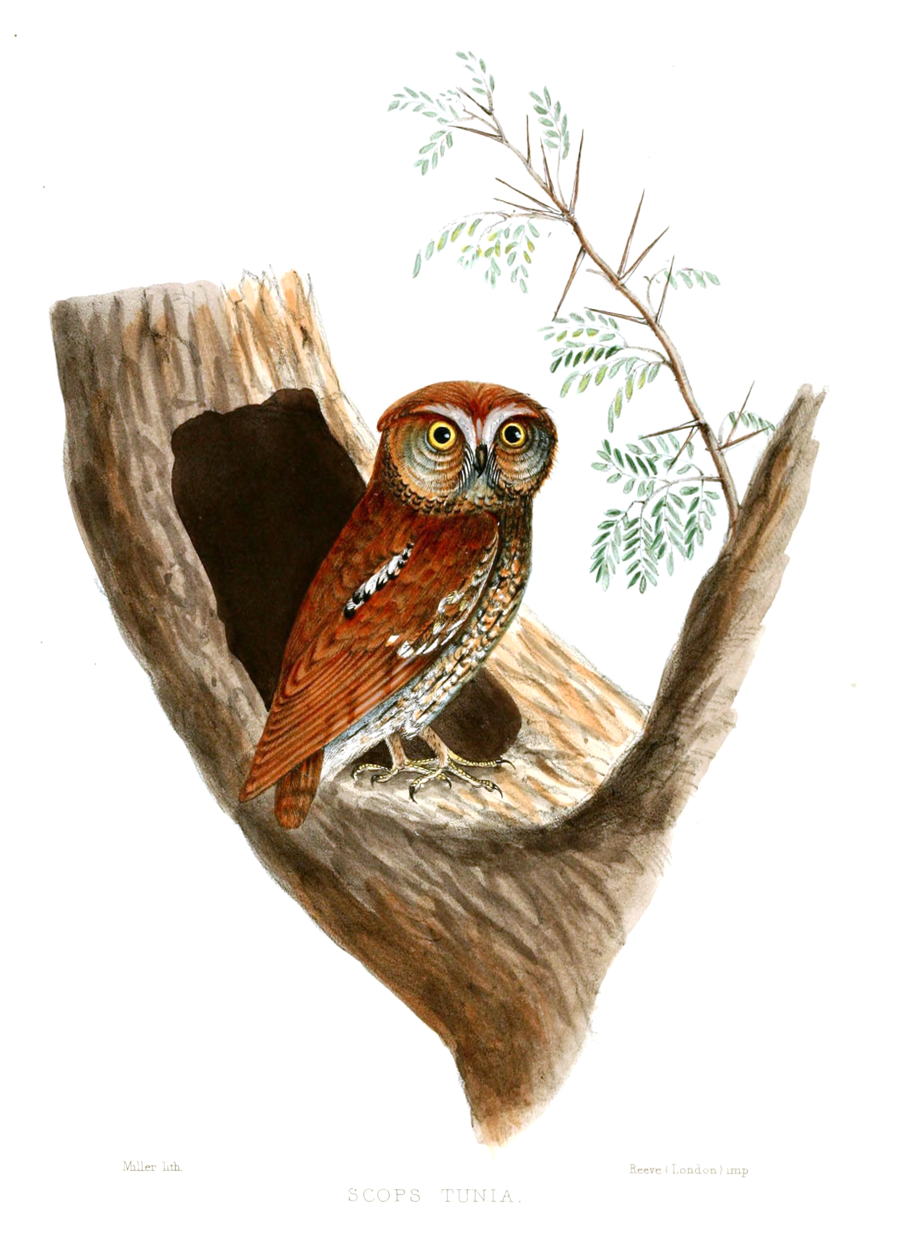 Otus sunia